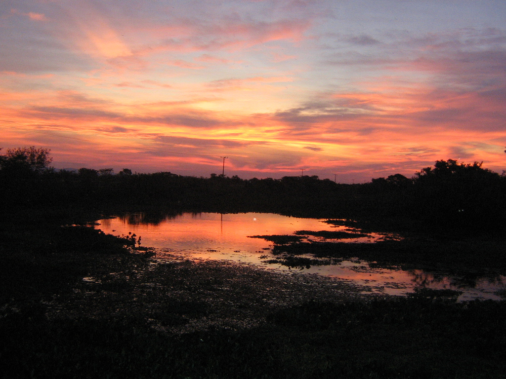 Cair da noite no Pantanal.